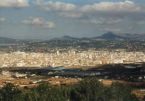 Blick auf Manacor Foto: Pedro Servera († 2005)